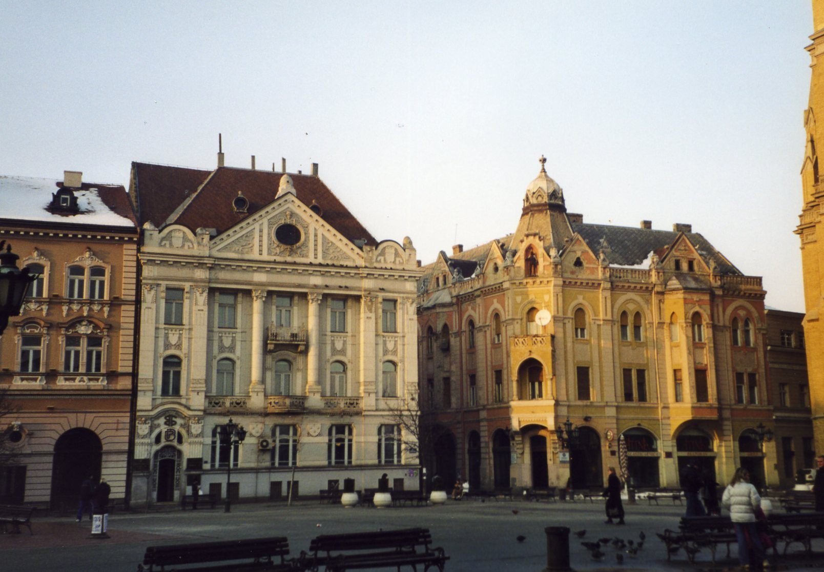 Trg Slobode in Novi Sad, Serbia Photo: Frans van Nes, January 2003